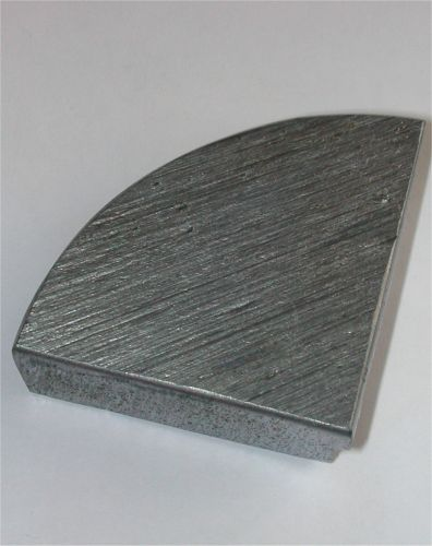 Bildbeschreibung: Vanadium, 99,9% rein Quelle: Foto aus meiner Elementesammlung Fotograf: Tomihahndorf Datum: März 2006